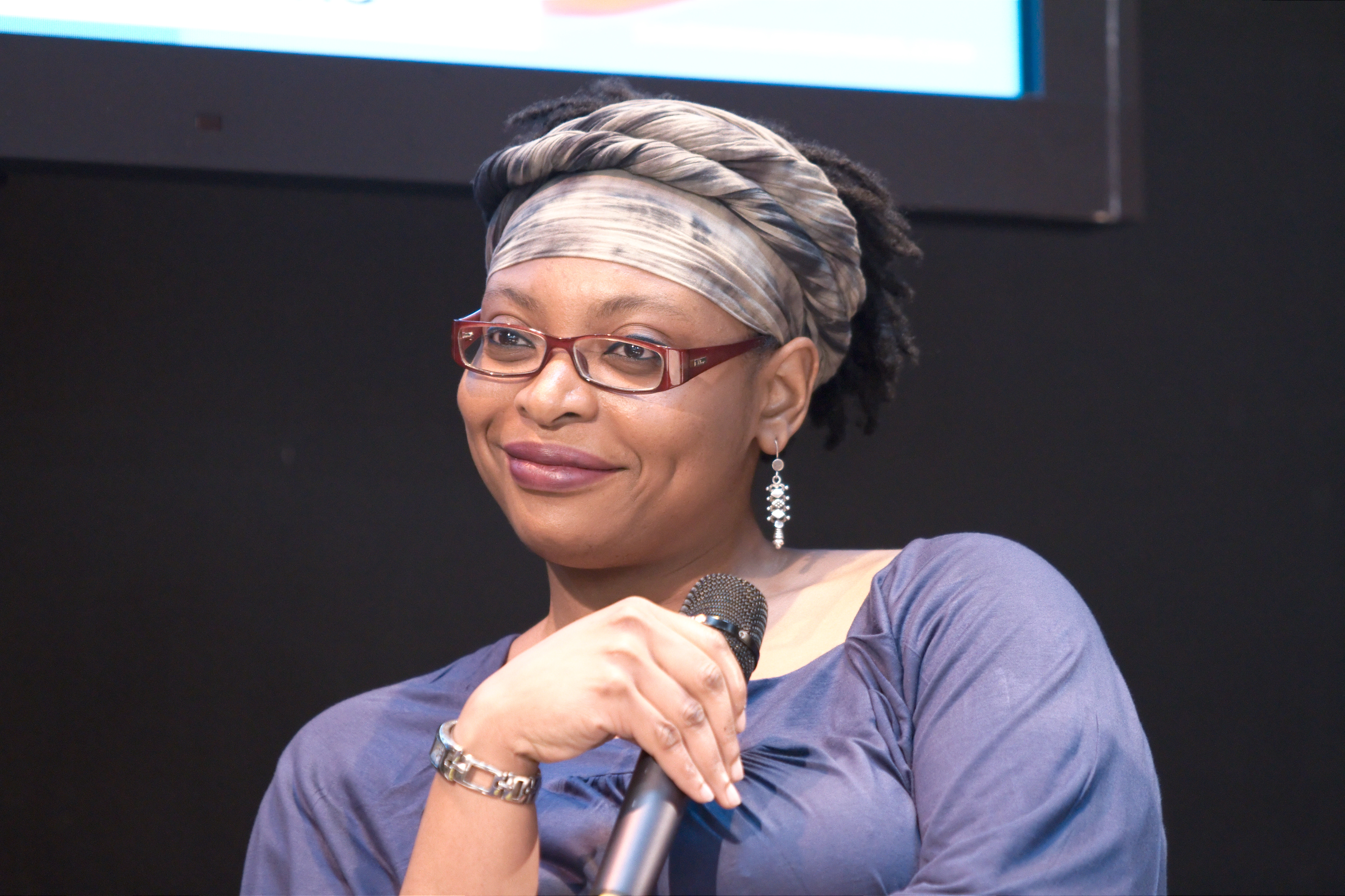 L'auteur Léonora Miano au Salon du livre de Paris pour le débat La Femme : un roman.